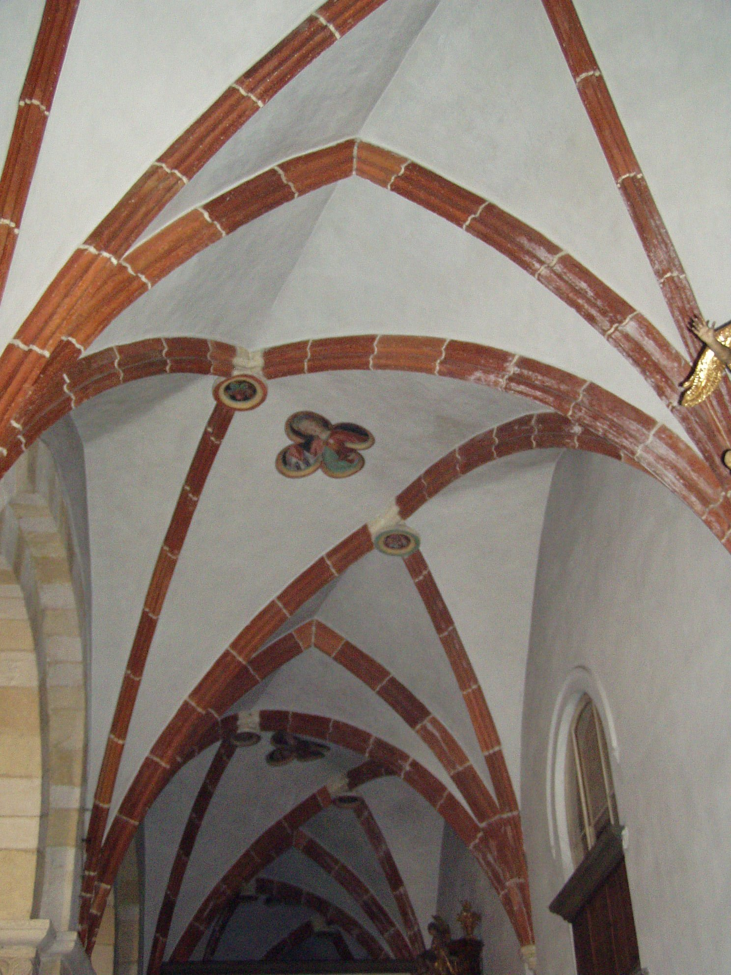 Benedictine Monastery of Sankt Paul im Lavanttal, Carinthia, Austria; Sprungrippengewölbe im nördlichen Seitenschiff der Stiftskirche.